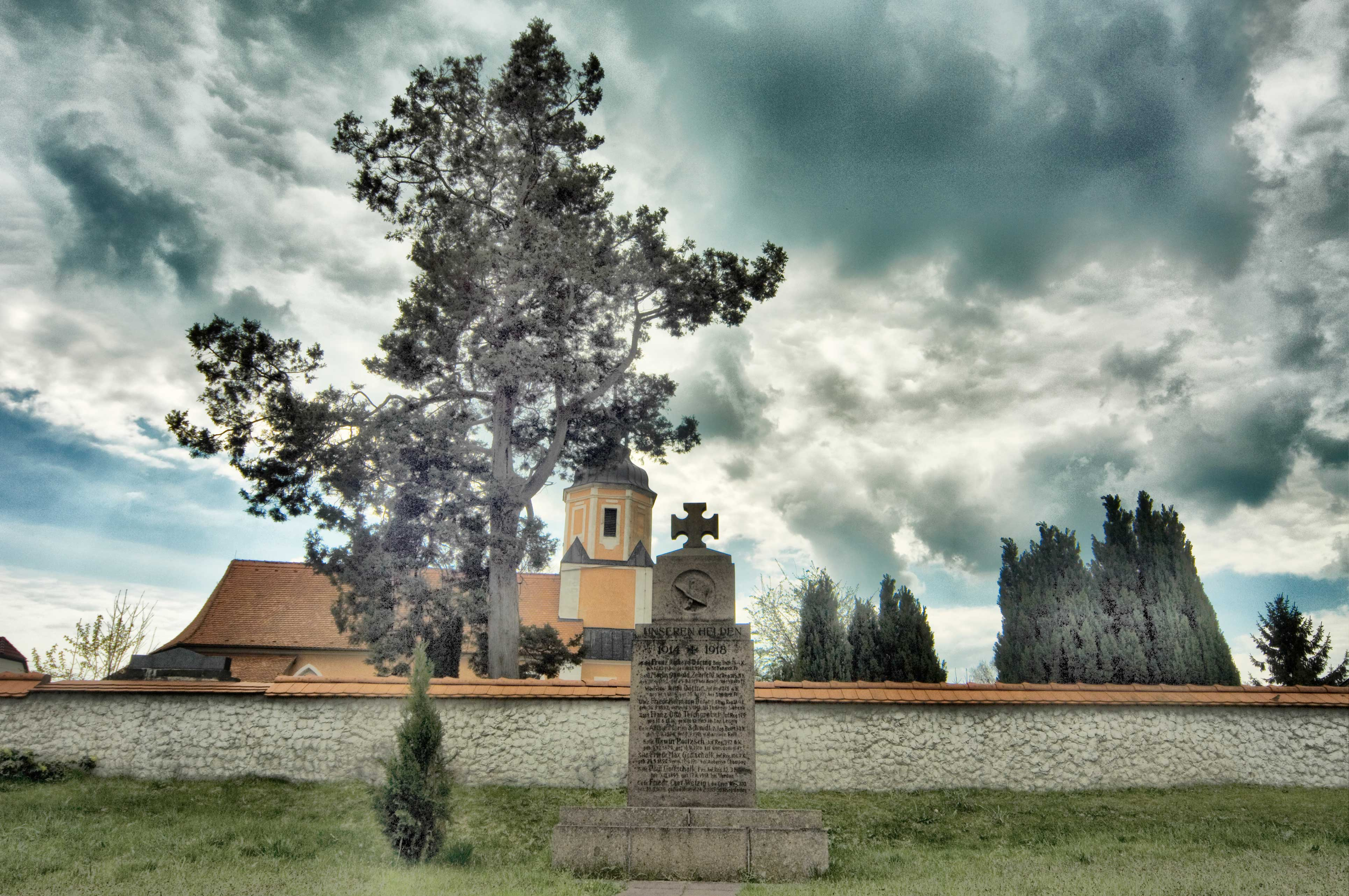 Kriegerdenkmal Erster Weltkrieg von Lampersdorf, Gemeinde Wermsdorf in Sachsen